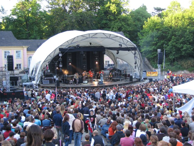 Clueso in concert, Junge Garde, Dresden